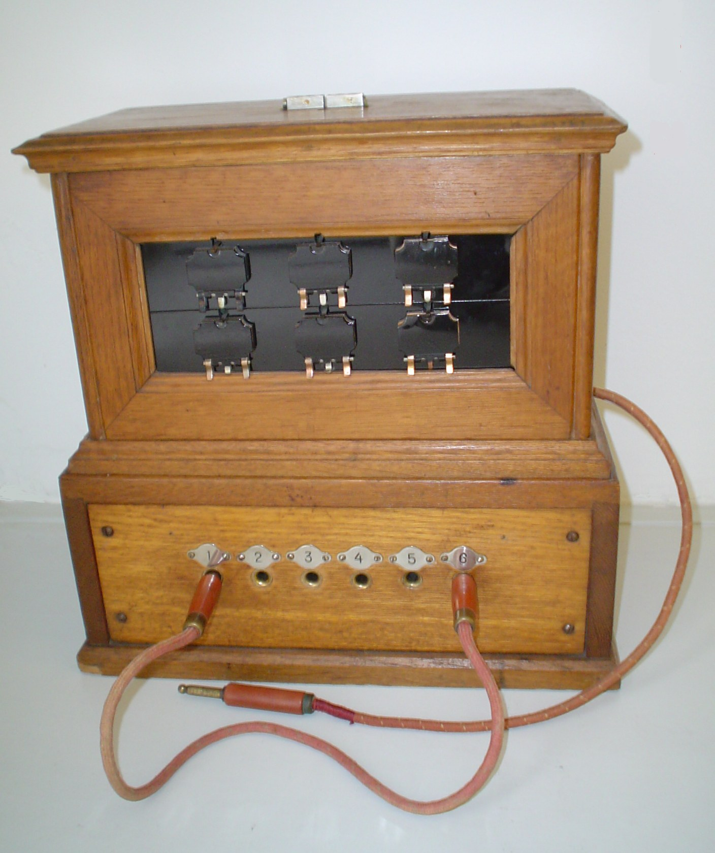 Hejma LB centralo